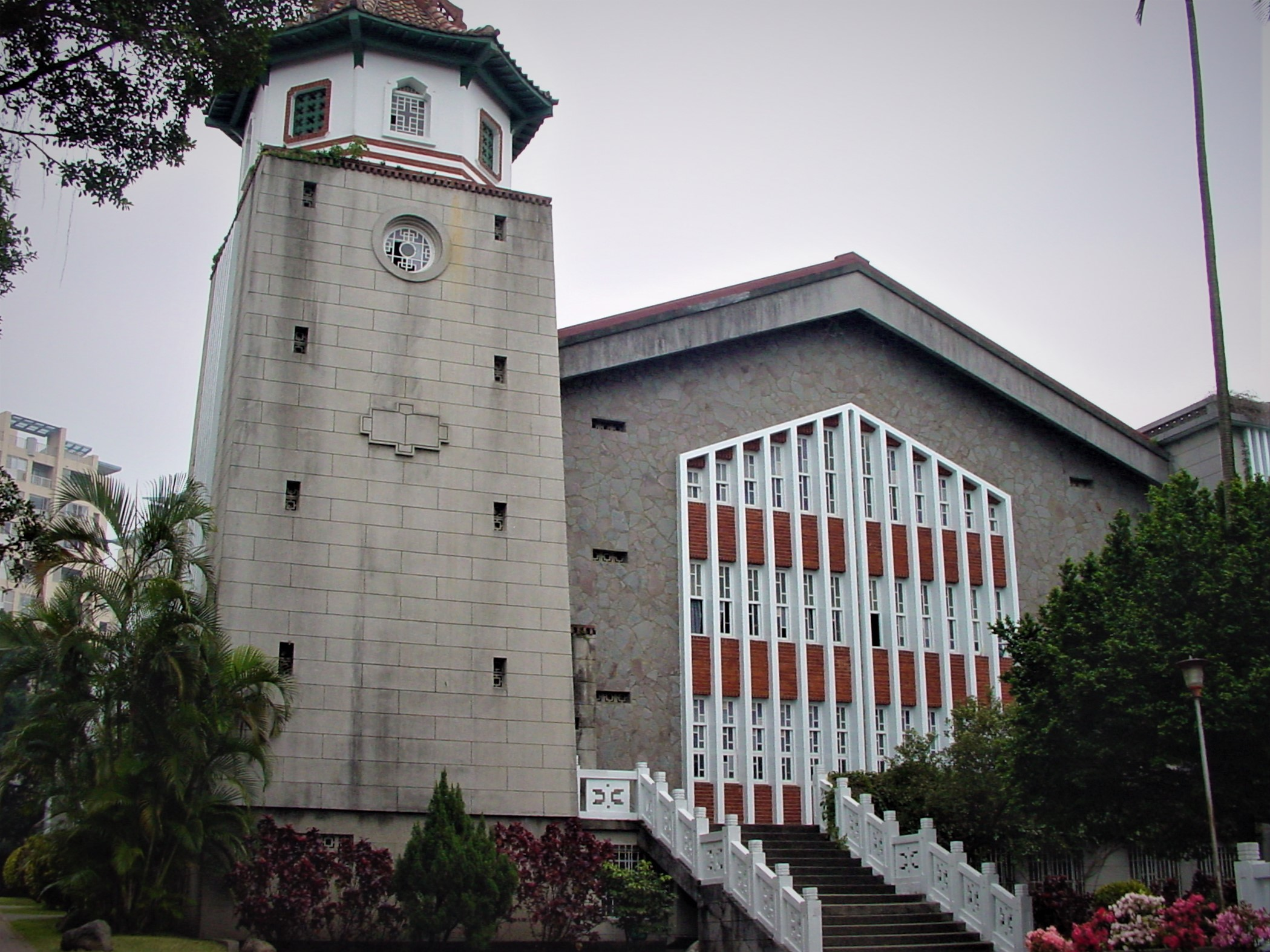 中文（台灣）: 新北市淡水淡江中學禮拜堂